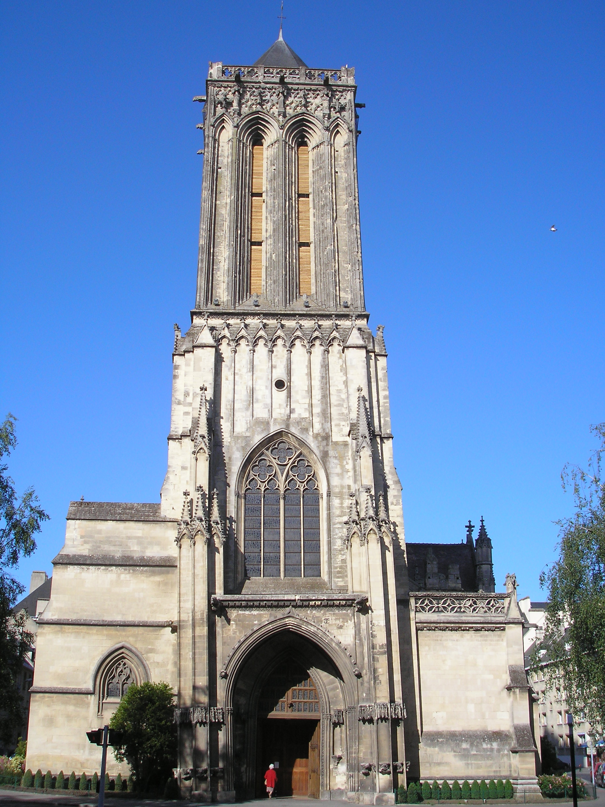 Caen (Normandie, France). Façade occidentale de l'église Saint-Jean.